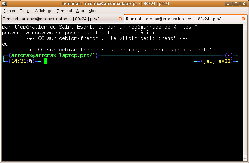 Screenshot de Terminal (la console XFCE).